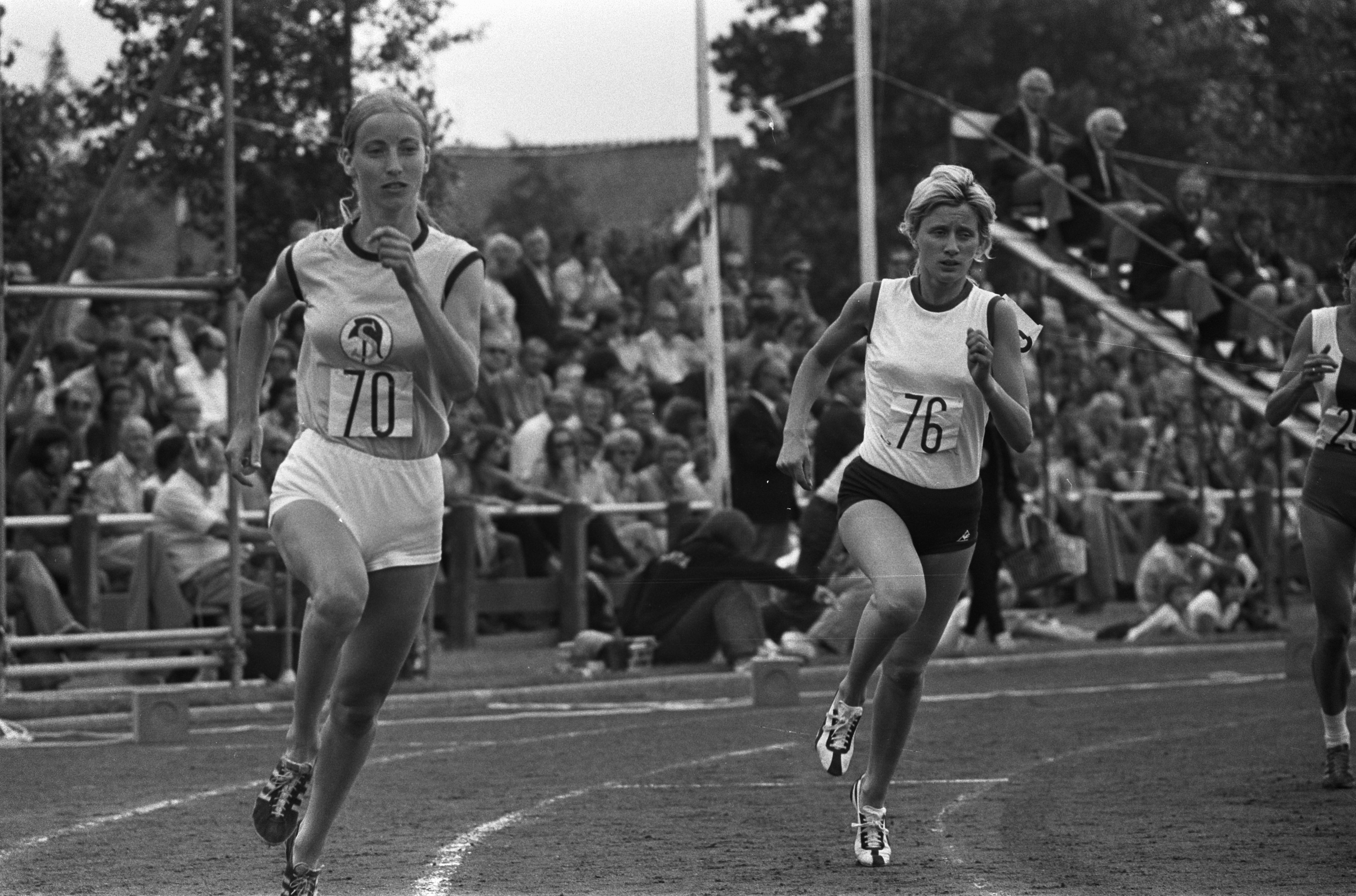 Collectie / Archief : Fotocollectie Anefo Reportage / Serie : [ onbekend ] Beschrijving : Nederlandse Atletiekkampioenschappen te Den Haag, Anneke de Lange (70) en rechts Joke van Gerven ( 76) op de 800 meter Datum : 14 juli 1973 Locatie : Den Haag, Zuid-Holland Trefwoorden : atletiek, hardlopen, sport Persoonsnaam : Gerven, Joke van, Lange, Anneke de Fotograaf : Punt, […] / Anefo Auteursrechthebbende : Nationaal Archief Materiaalsoort : Negatief (zwart/wit) Nummer archiefinventaris : bekijk toegang 2.24.01.05 Bestanddeelnummer : 926-5465